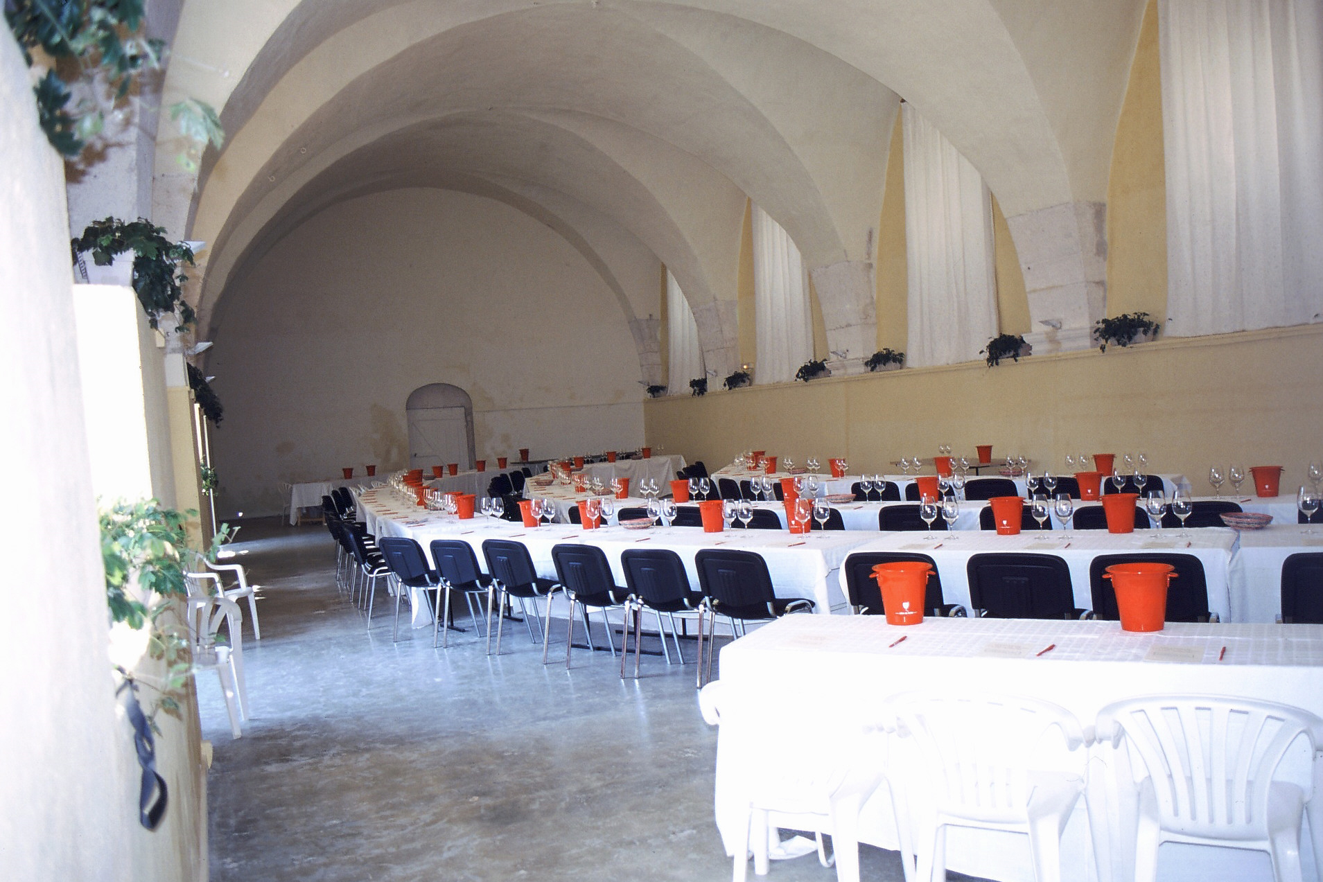 salle de receptions et conférences du Palais